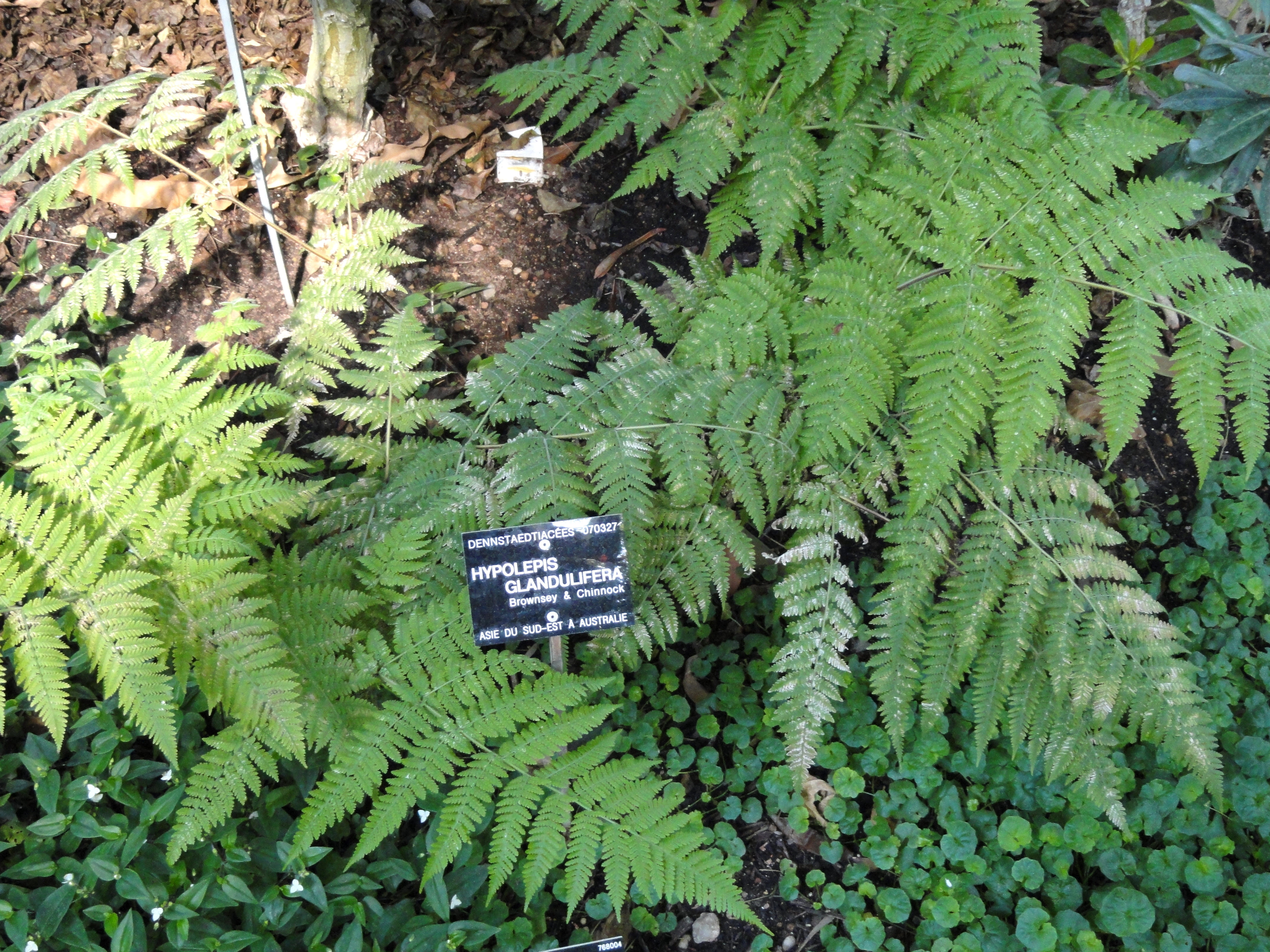 Hypolepis glandulifera specimen in the Jardin Botanique de Lyon, Parc de la Tête d'Or, Lyon, France.